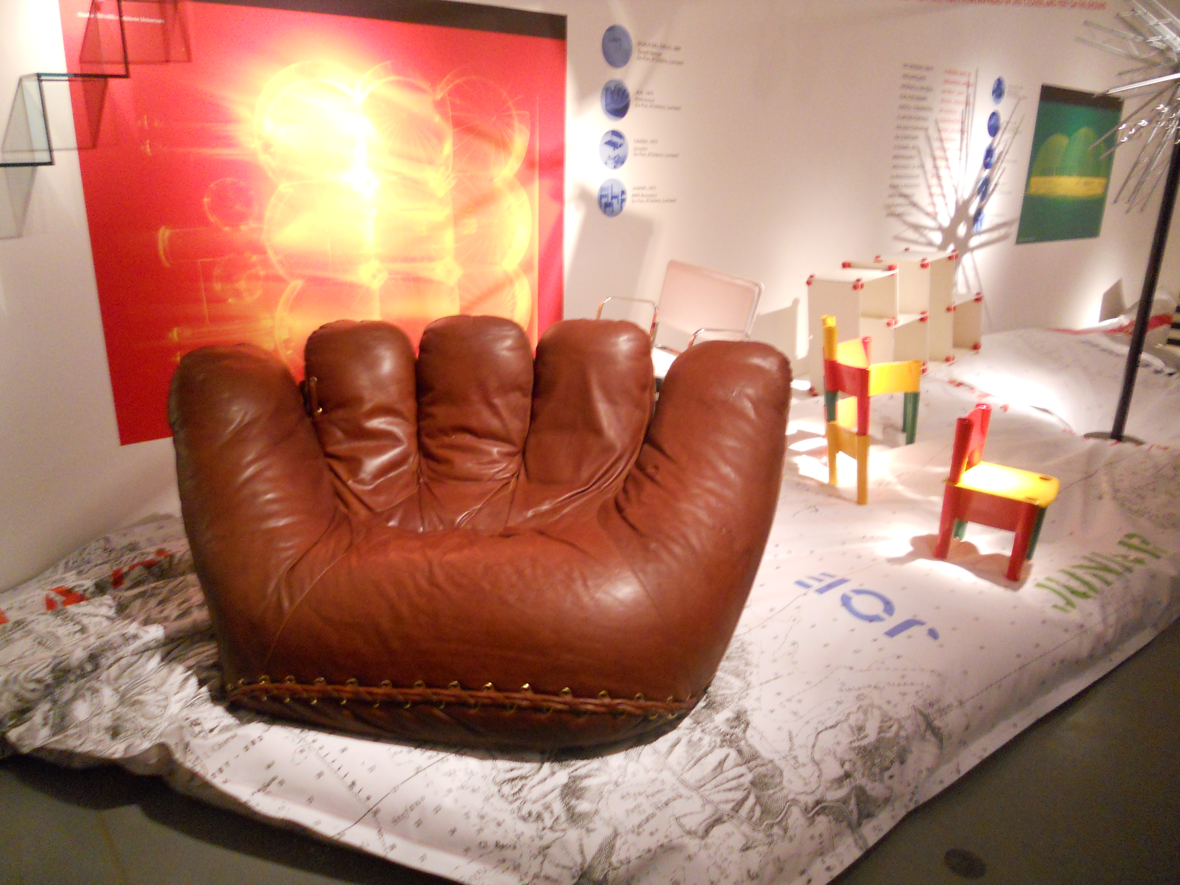 tra gli altri la poltrona "Joe" dei designer italiani De Pas D'Urbino e Lomazzi per Poltronova (ITALIA 1971)